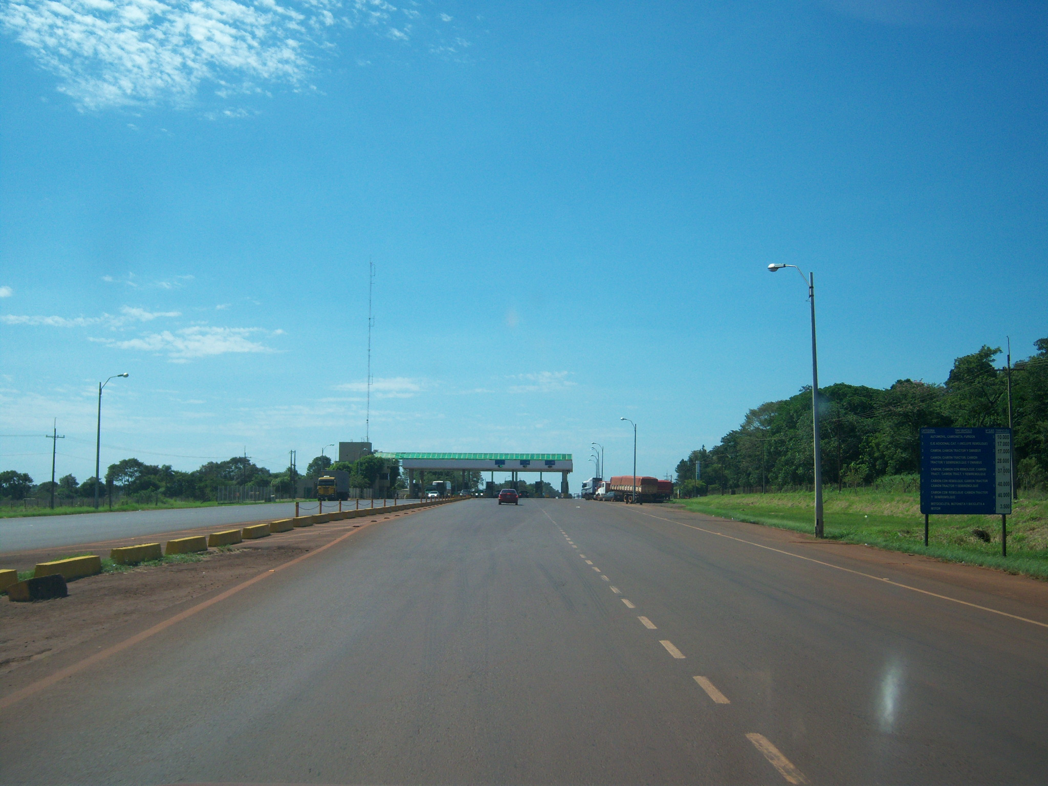 Estación de Peaje ubicado en Minga Guazú, Alto Paraná, Paraguay.